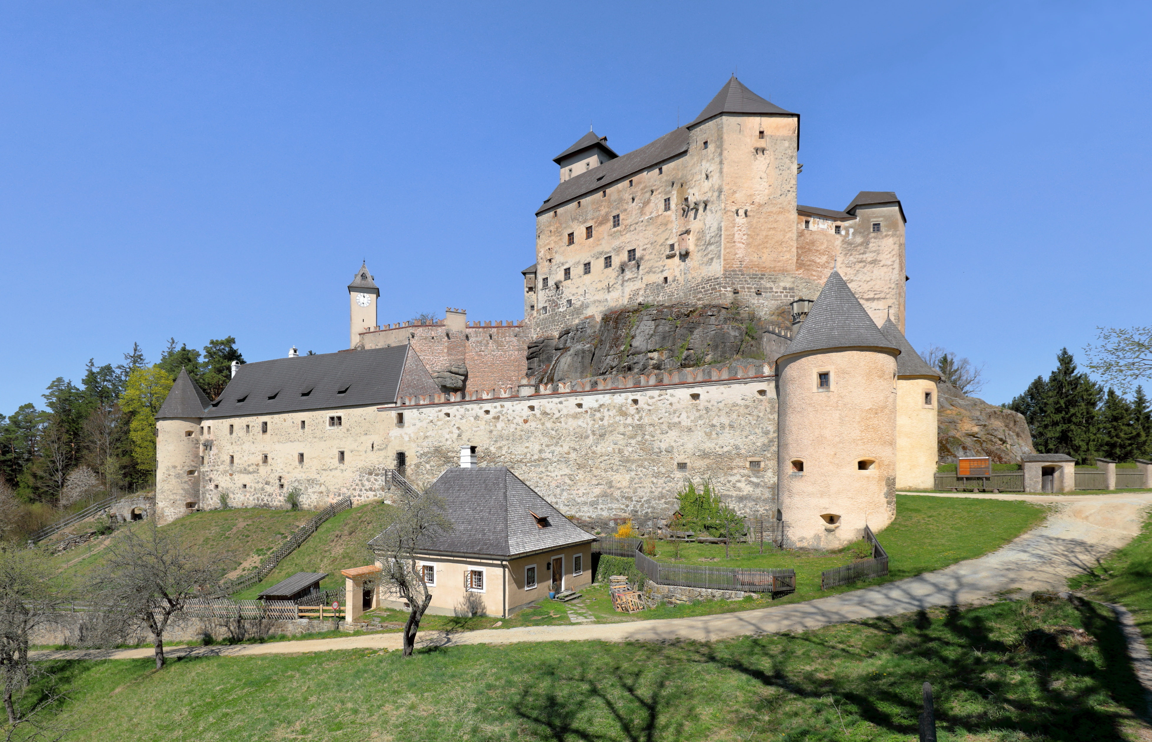 Südansicht der Burg Rappottenstein im westlichen Waldviertel und auf dem Gemeindegebiet der niederösterreichischen Marktgemeinde Rappottenstein.Die bedeutende Burganlage des 12. Jahrhunderts wurde nie erobert und von den Kuenringer errichtet. Nach mehreren Besitzerwechsel kam sie 1664 durch Kauf an die heutigen Besitzer, die Grafen von Abensperg und Traun.